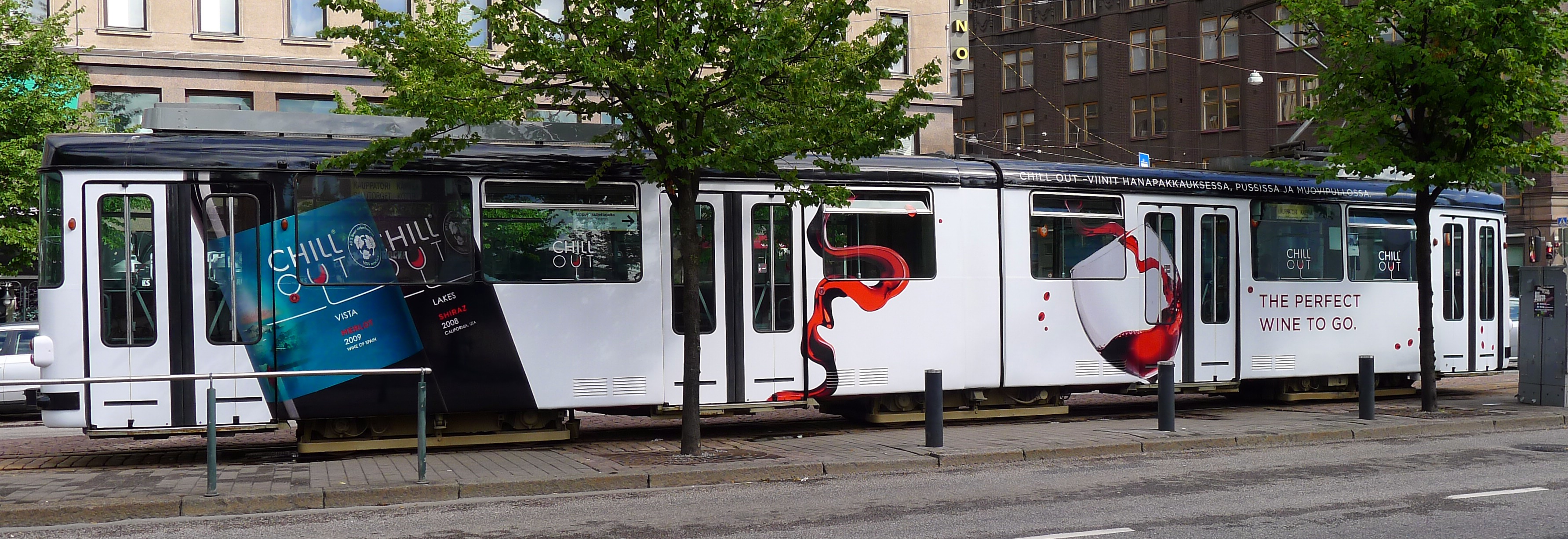 Helsinki Straßenbahn Nr. 151 („Typ Mannheim“) von der Eingangsseite